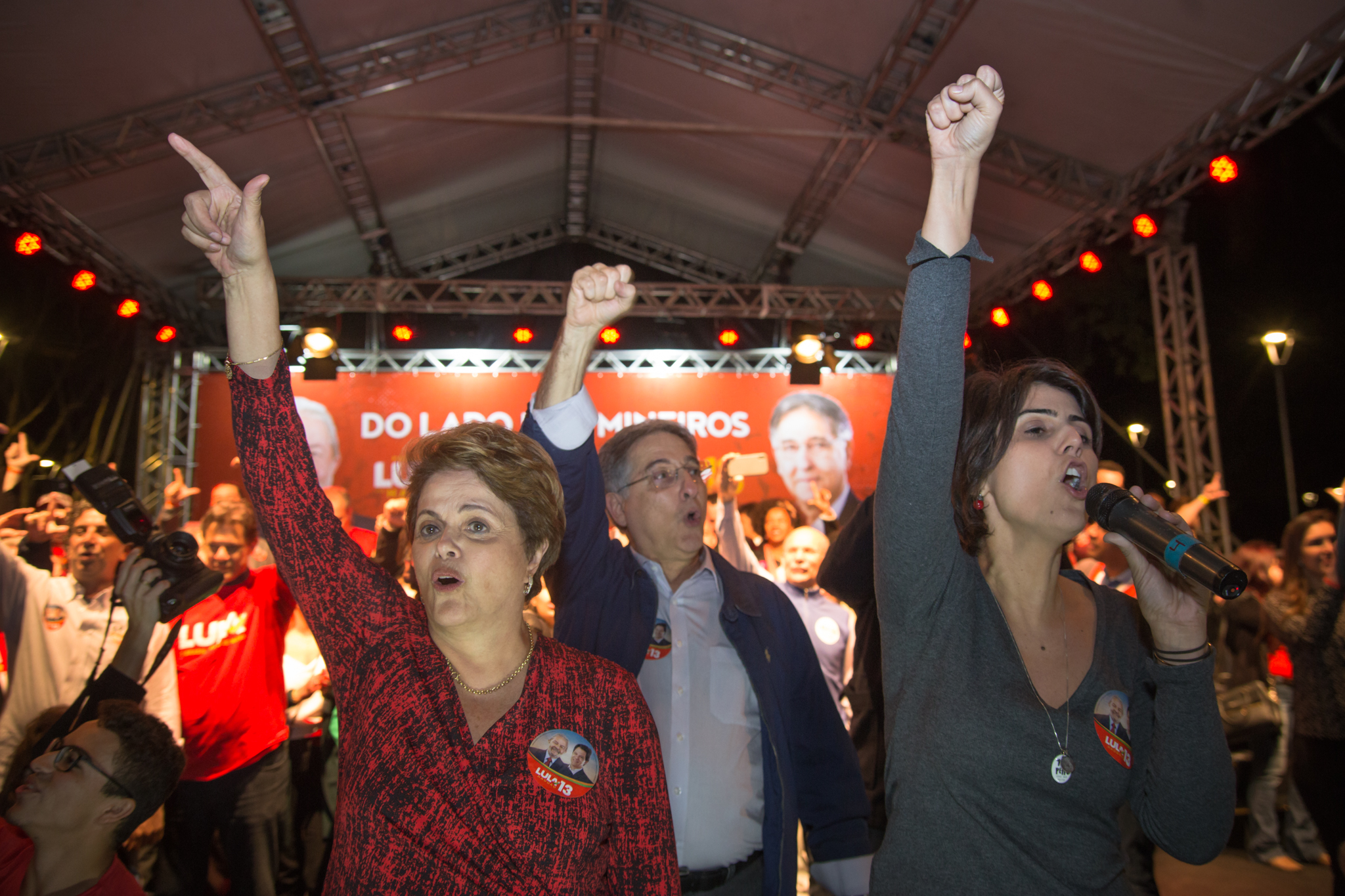 Dilma Rousseff, Fernando Pimentel e Manuela d'Ávila em 28 de agosto de 2018.